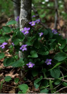 Suņu vijolīte